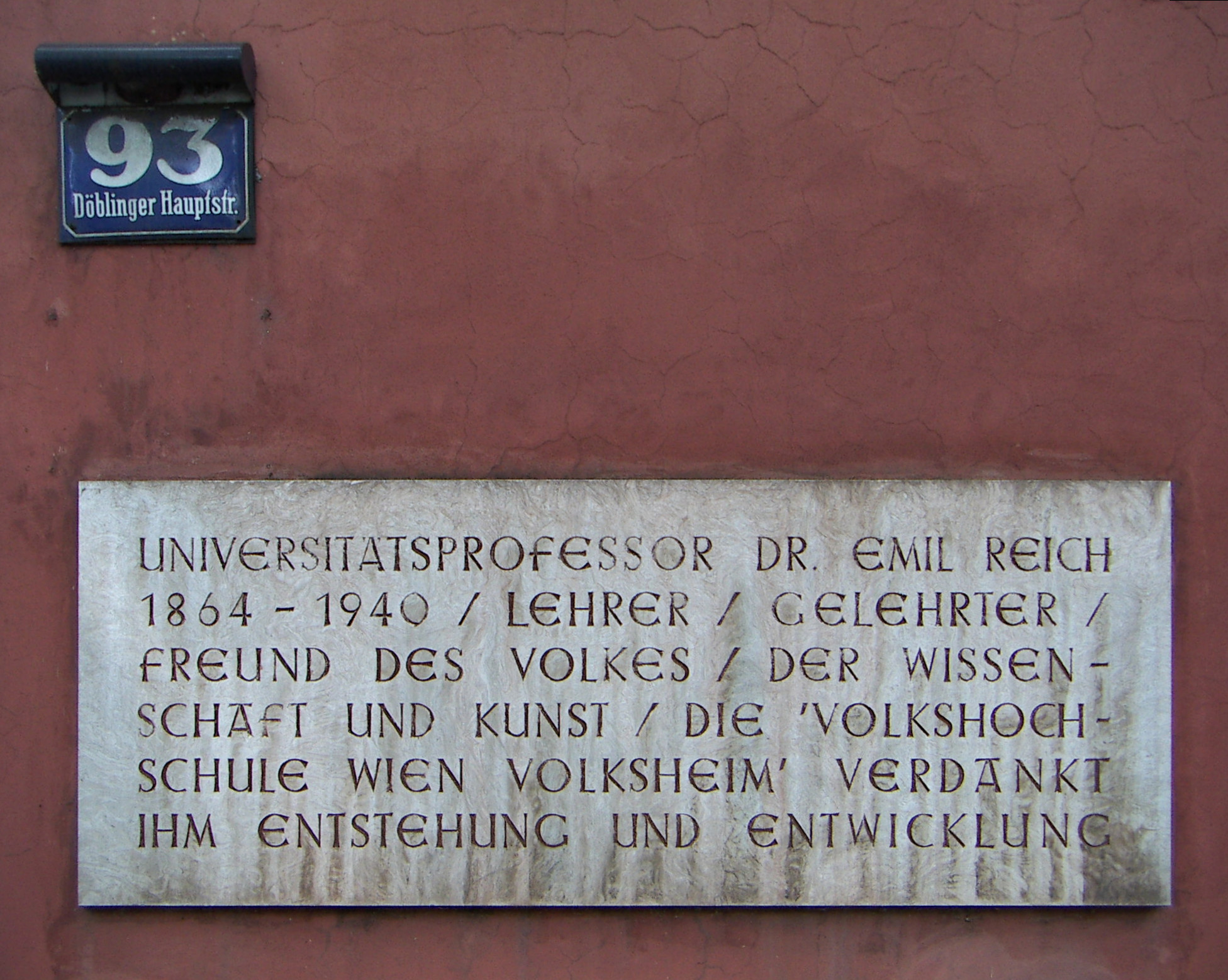 Emil Reich 1864 - 1940, Gründer Volkshochschule Wien Volksheim, Gedenktafel